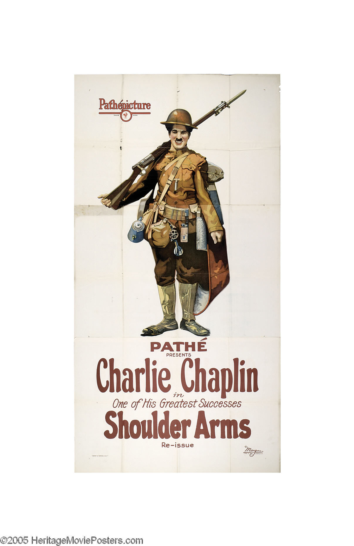 Movie poster